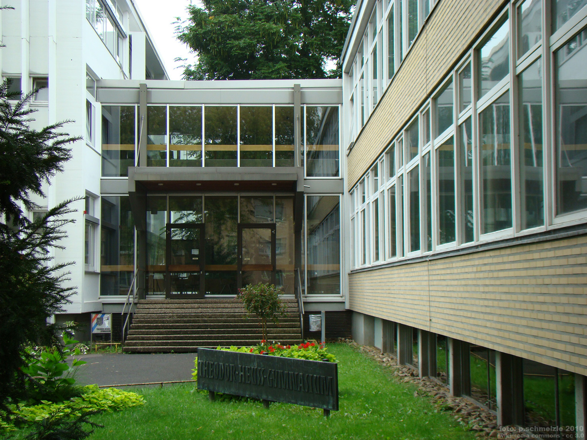 Theodor-Heuss-Gymnasium in Heilbronn, Eingangsbereich